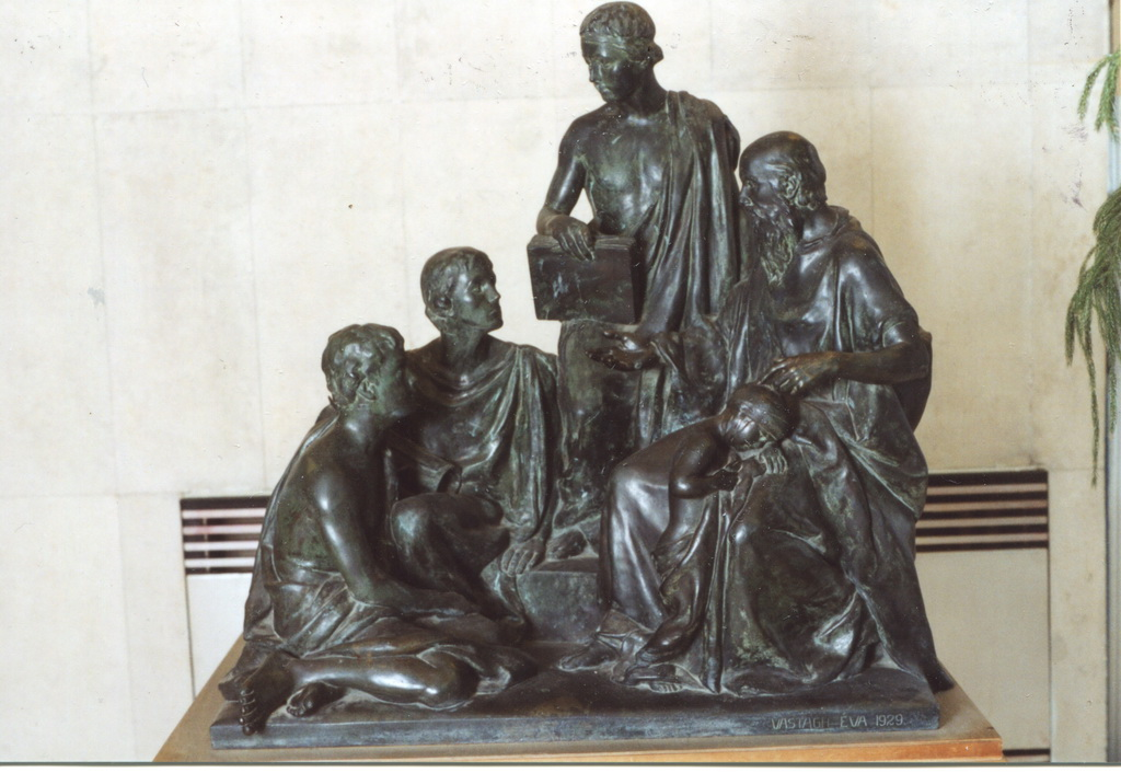 Tanítást ábrázoló jelenet (1929) (Budapest, Semmelweis Egyetem Radiológiai Klinika)